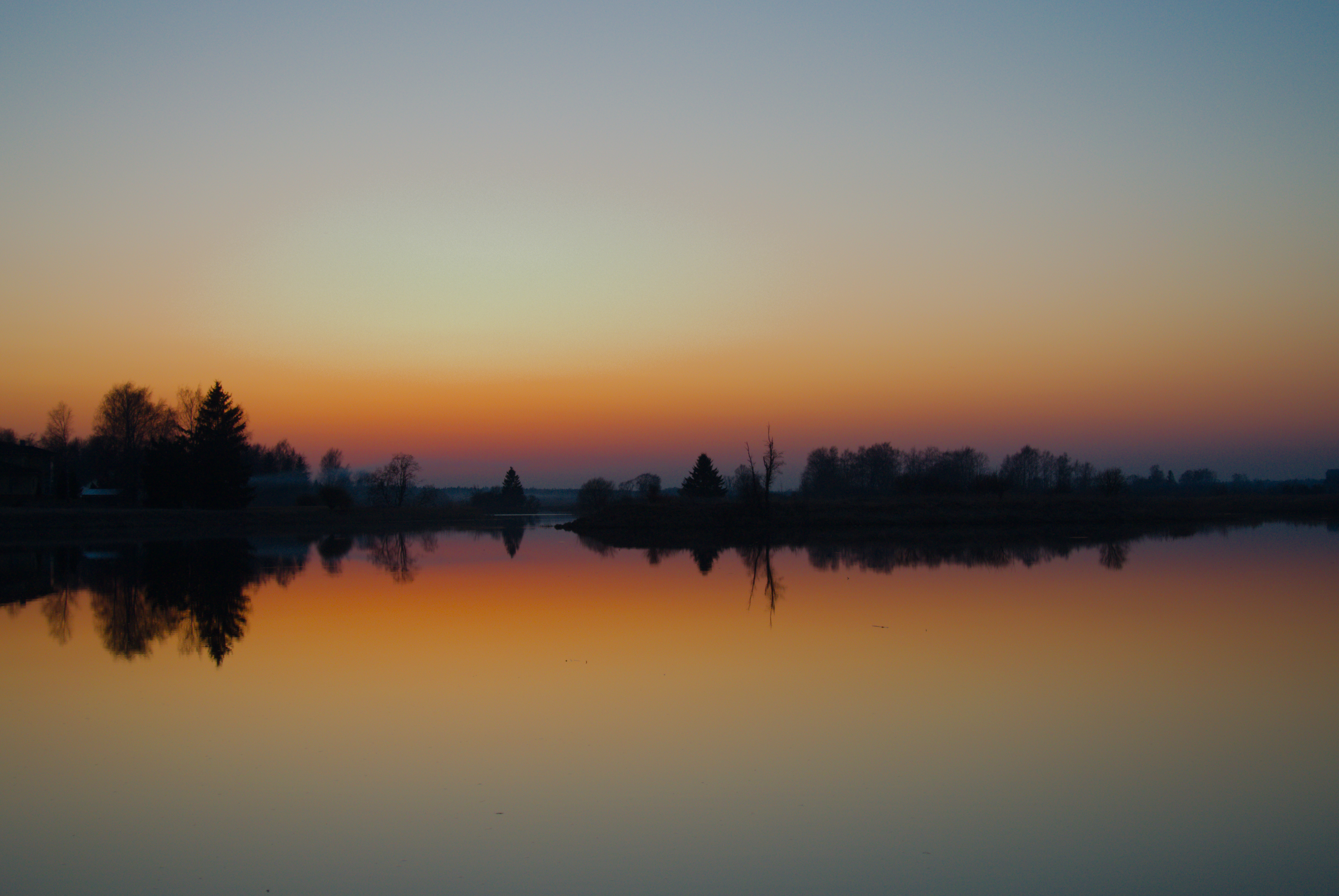 Ilmatsalu paisjärv (2018)